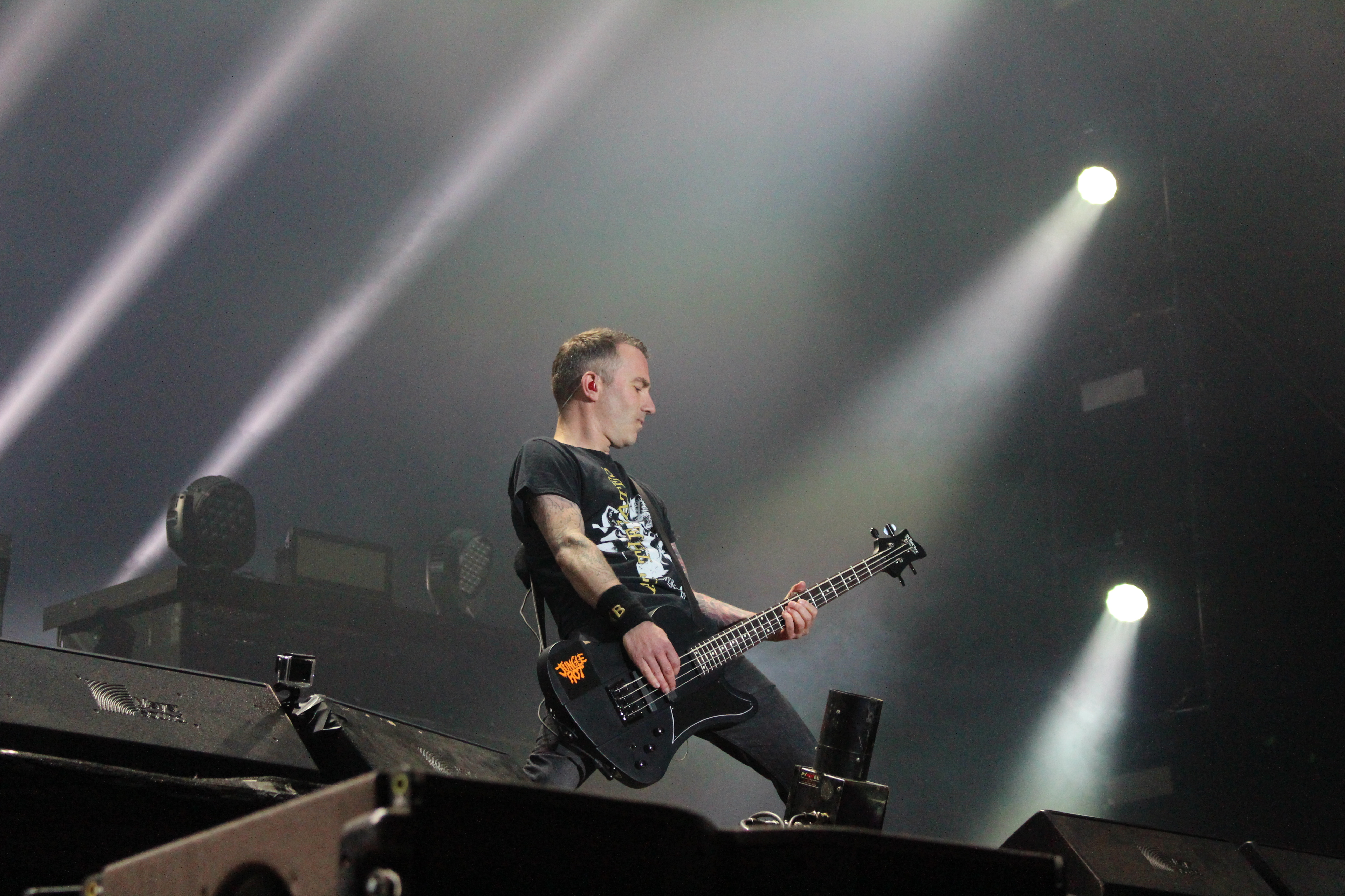 Festivalsommer This photo was created with the support of donations to Wikimedia Deutschland in the context of the CPB project "Festival Summer".